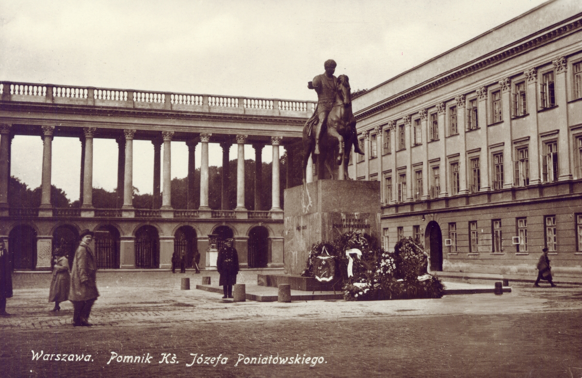 Pomnik księcia Józefa Poniatowskiego w Warszawie na przedwojennej pocztówce (w tle Pałac Saski). Wysadzony 16 grudnia 1944.